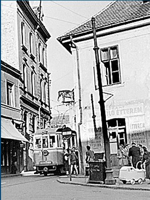 A Jókai téren álló Elefántos ház.